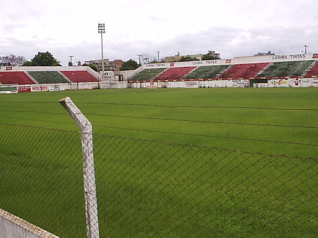 Estádio da Zona Sul, casa da Sociedade Esportiva e Recreativa Santo Ângelo, Rio Grande do Sul